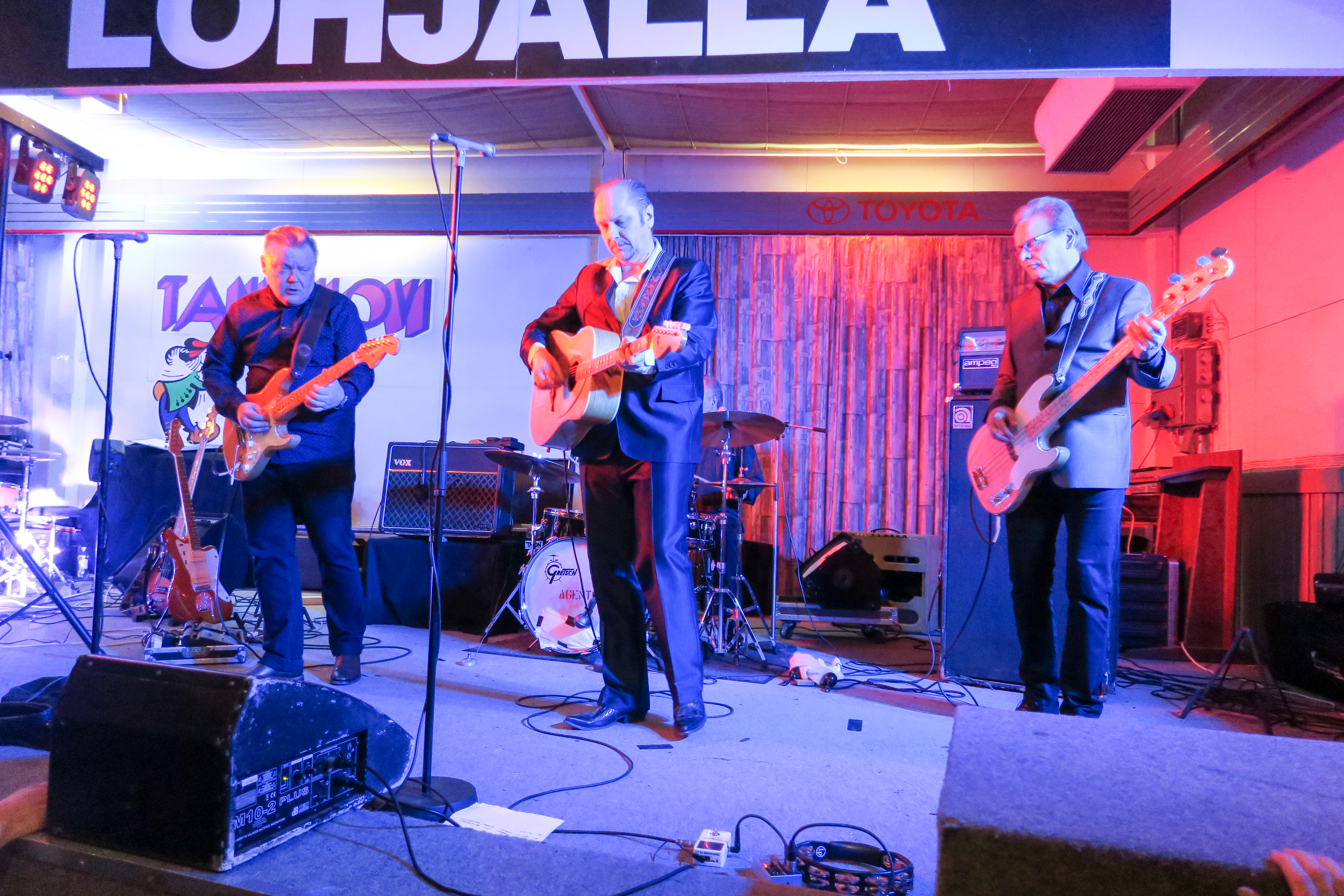 Agents yhtye